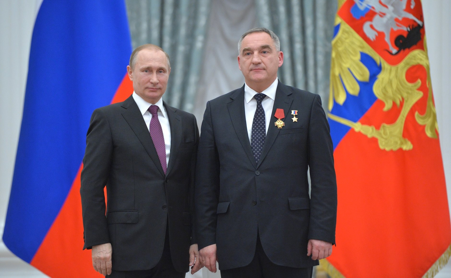 Церемония вручения государственных наград Российской Федерации. Орденом «За заслуги перед Отечеством» IV степени награждён инструктор-космонавт-испытатель Центра подготовки космонавтов имени Ю. А. Гагарина Александр Скворцов